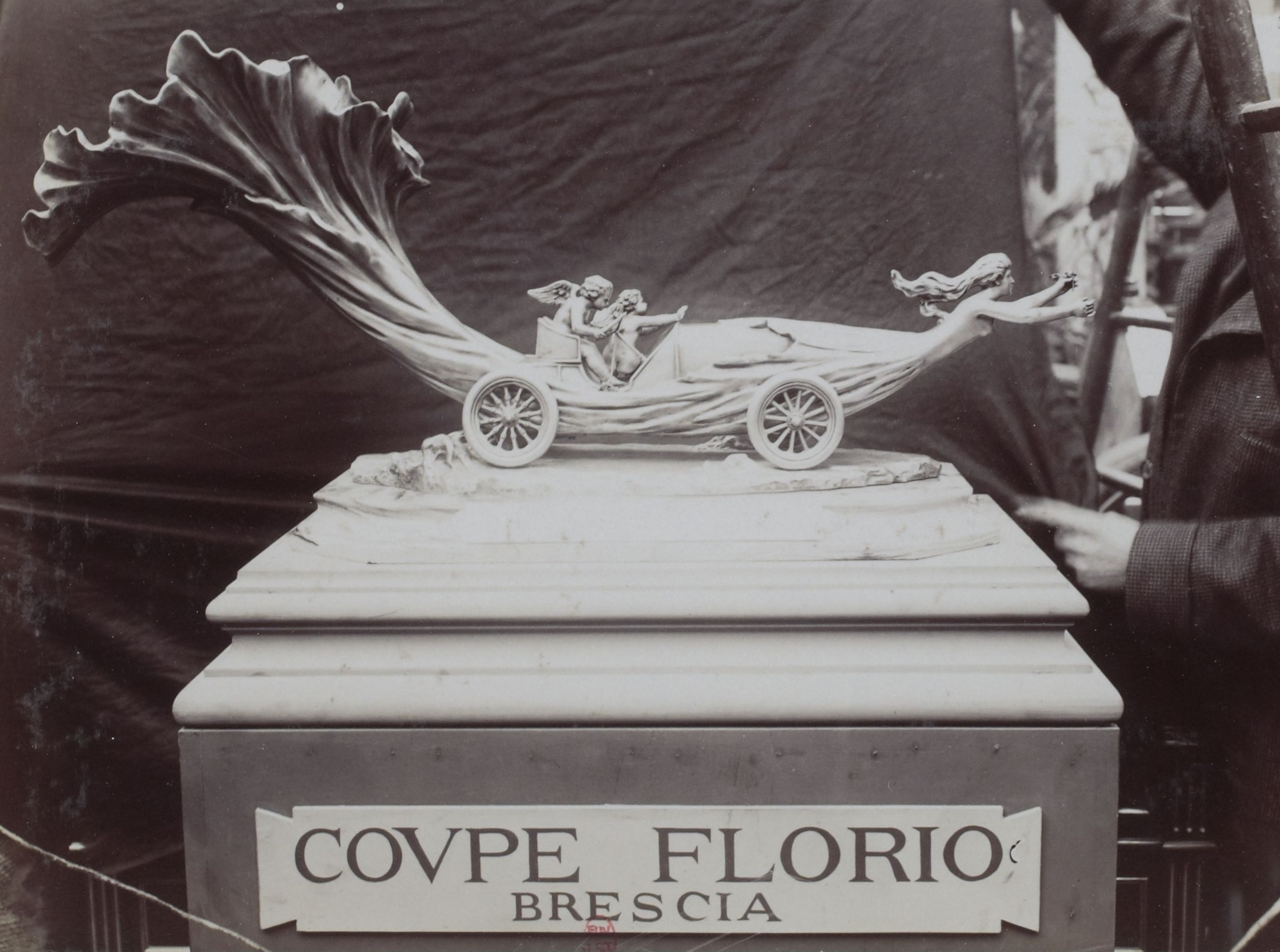 [Collection Jules Beau. Photographie sportive] : T. 31. Années 1905 et 1906 / Jules Beau : F. 21v. [Concours de voitures de ville, Paris, 21 décembre 1905]